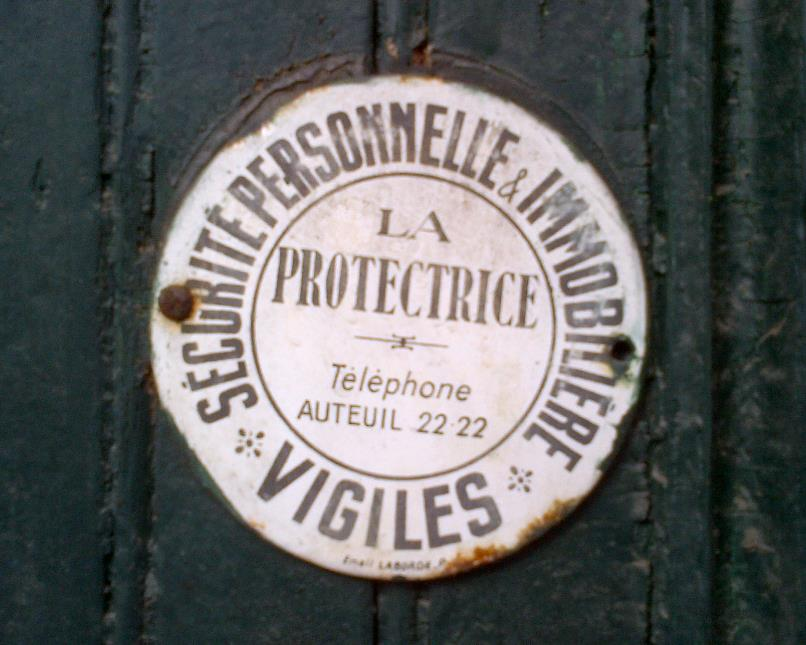 Plaque émaillée de l'ancienne société de surveillance "La Protectrice". Télépnone : AUTEUIL 22 22.